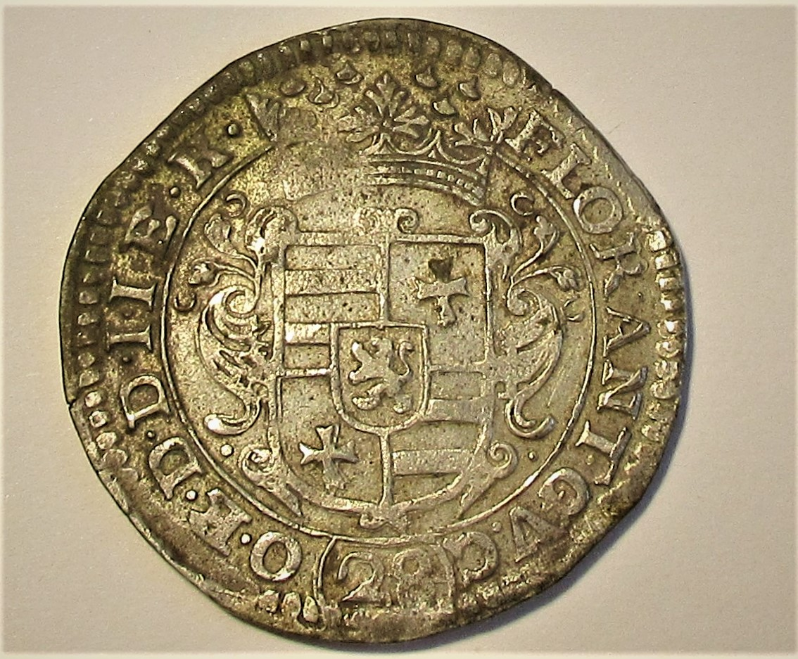 Wappenseite eines Oldenburger Silberguldens um 1640